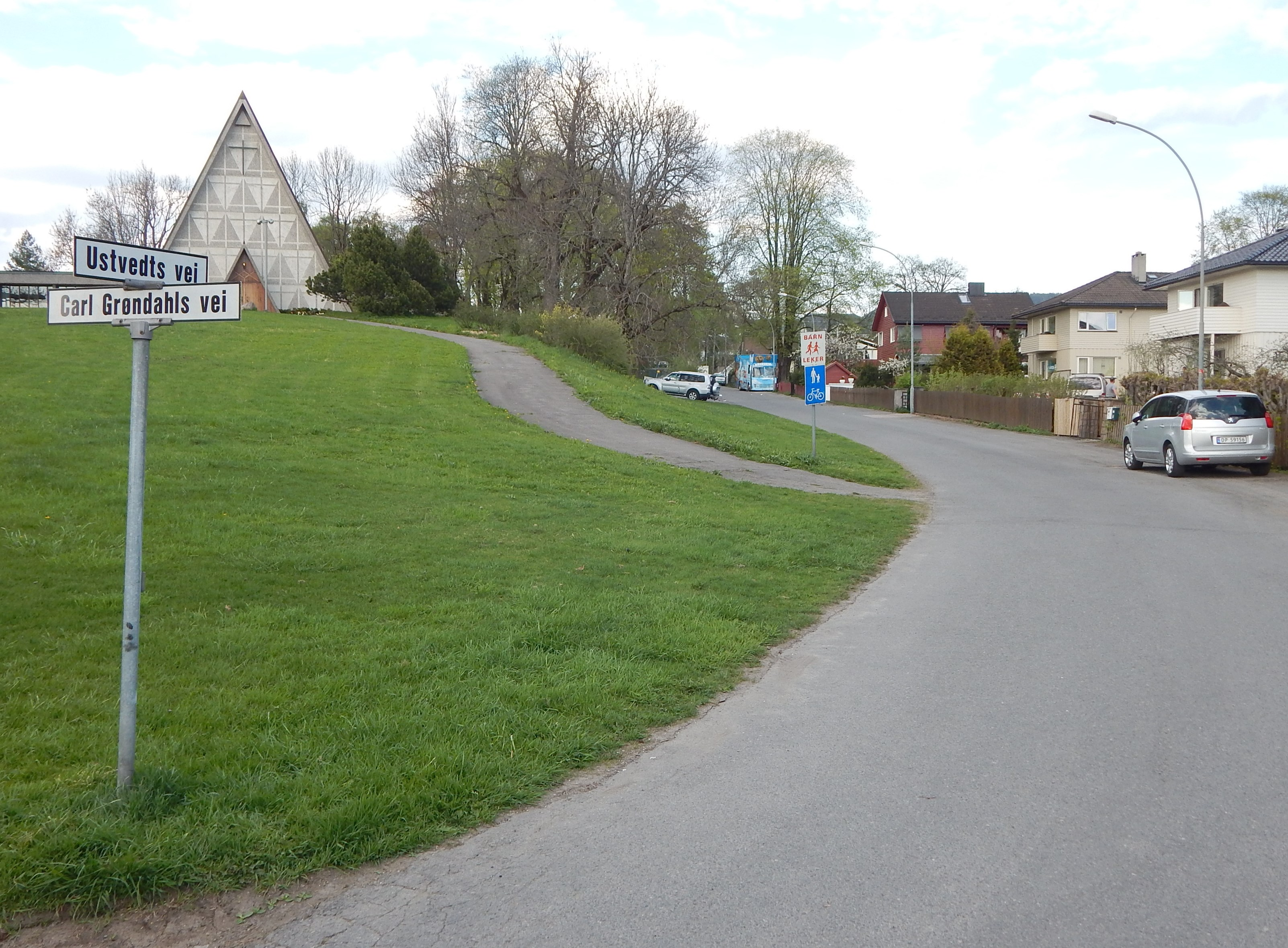 Ustvedts vei tar av fra Carl Grøndahls vei ved Bakkehaugen kirke.